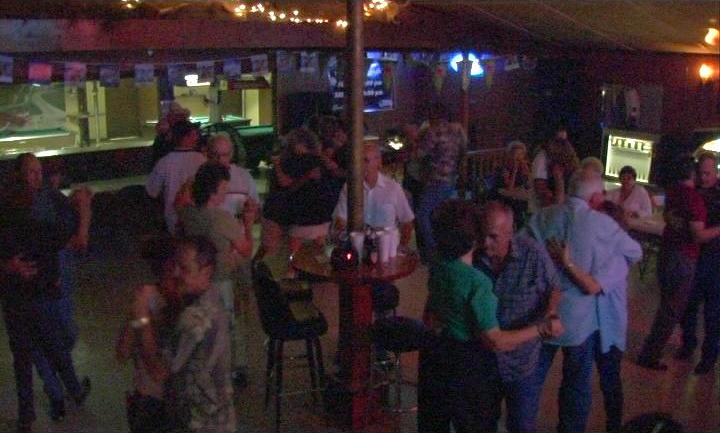 Dancing at Grand Isle, Louisiana. ENTRE HURACANES •Documental + Web 2011 •Dir. Stéphane M. Grueso •Prod. Stéphane M. Grueso •elegant mob films / TVE •1 x 58' / color / stereo •HD - HDCAM Este documental es un viaje por el escenario desolador que dejó el huracán Katrina a su paso por Luisiana y la llegada del huracán Rita, pocas semanas después. En la película hablamos con todo tipo de personas, técnicos de FEMA, voluntarios de la Cruz Roja, Pescadores de gambas afectados por el huracán, bomberos,… Compartimos el día a día con estos personajes y con ellos descubrimos como el impacto del huracán vas más allá de la destrucción, trayendo consigo preguntas sobre la política en los EE.UU., relaciones del gobierno local con el federal, racismo, ecología… Y entre tanto un Nuevo huracán aparece por el horizonte: Rita. Más info en: ENGLISH---------------------------------- BETWEEN HURRICANES •Documental 2005 •Dir. + Prod. Stéphane M. Grueso & Joanna Gröning •G&G Filmproduktion GbR •1 x 56' / color / stereo •DVCAM This feature documentary is a journey through the aftermath of hurricane Katrina and into the path of hurricane Rita. A story of discovery through southern Louisiana. The film’s perspective could not be broader. Interviews range from FEMA officials, Red Cross workers, to local volunteers, fire chiefs and shrimp boat fishermen. Each individual delves into their personal opinions about the impact of hurricane Katrina – a multi-faceted economic, political, ecological, ethical, and social storm. Sharing thoughts on U.S. politics - specifically on federal vs. local government relations, race, and religion – the personal interviews address issues that beg for more attention and discussion. More Infos in